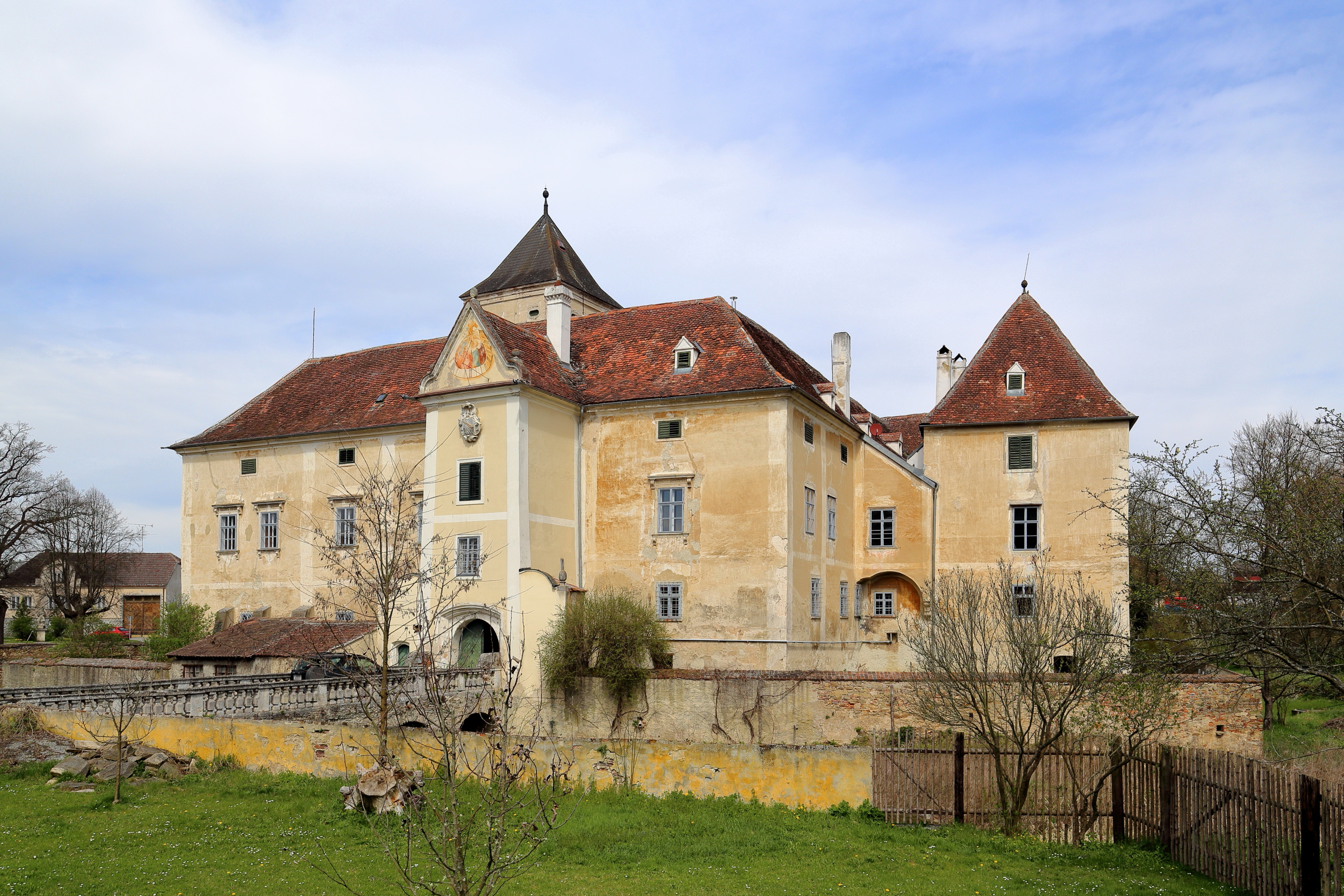 Südostansicht des Schlosses in Oberhöflein, ein Ortsteil der niederösterreichischen Marktgemeinde Weitersfeld.Das Schloss wurde im 16. Jahrhundert weitgehendst neu errichtet und ist von einem Wassergraben umgeben. Die vierseitige, zweigeschoßige und kubische Anlage hat einen dreigeschossigen Fassadenturm im Westen und einen quadratischen Turm im Osten; der Zugang erfolgt über eine Brücke im Süden.